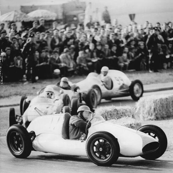 Zentralbild Kohls 23.4.1961 Auf der Halle-Saale-Schleife dröhnen die Motoren Am 23.4.1961 erfolgt um 10.00 Uhr der Start zum Internationalen Rennen auf der Halle-Saale-Schleife. Bereits in den frühen Morgenstunden des 22.4.61 trainierten die Fahrer und machten sich so mit dem schweren Kurs vertraut. UBz: Kurt Kühnke (Braunschweig) als erster in der Kurve.